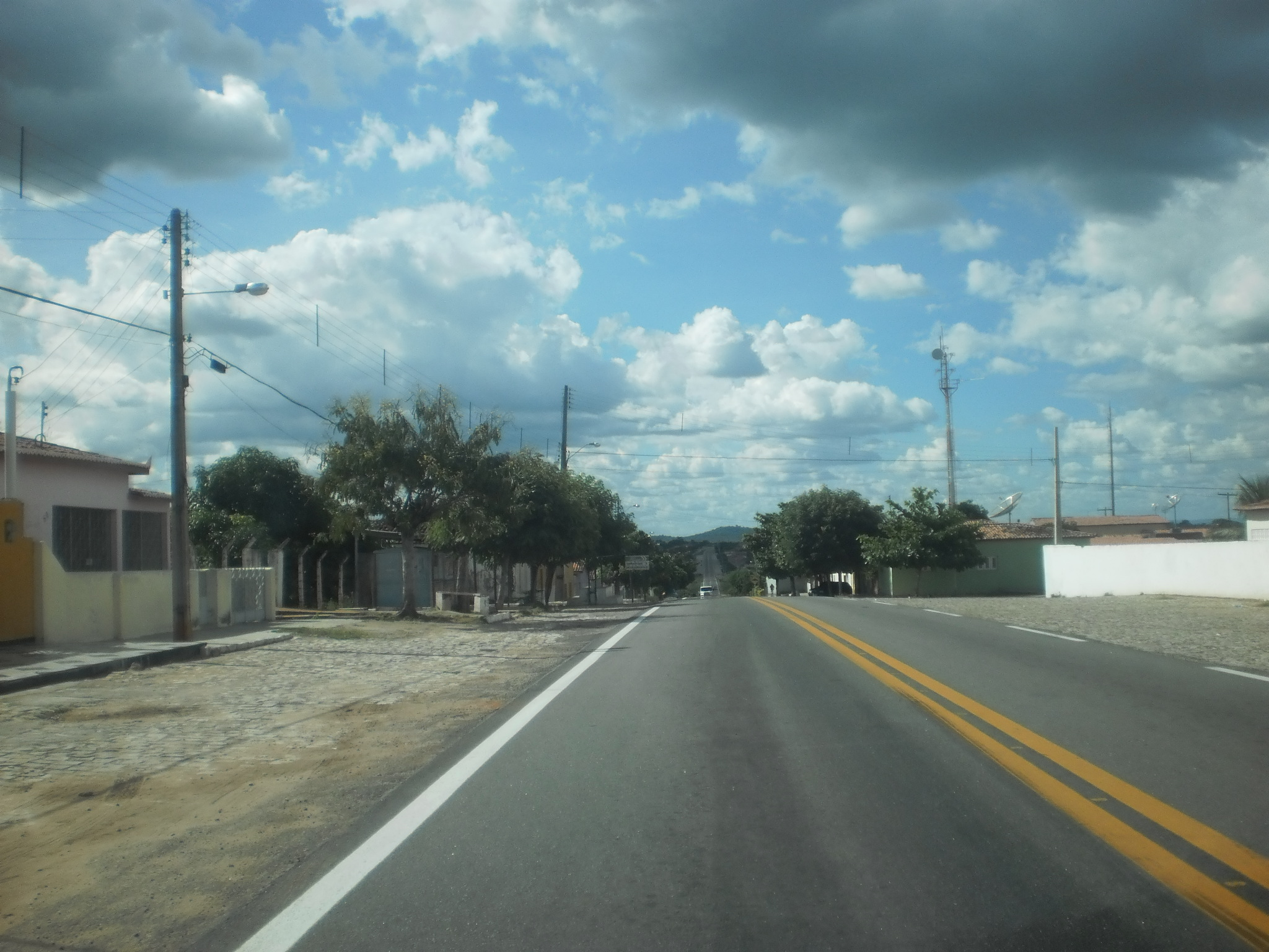 José da Penha, Rio Grande do Norte, Brasil.